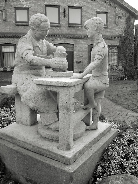 Das sogenannte Töpferdenkmal soll eine Szene aus der Erzählung "Mien Jungsparadies" von Klaus Groth darstellen.